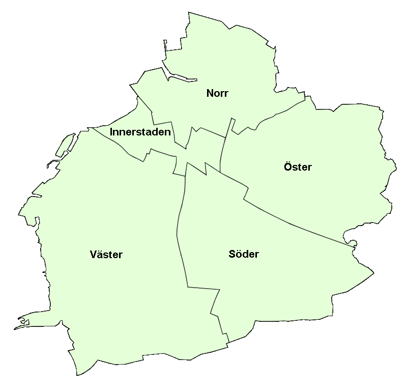 stadsdelar